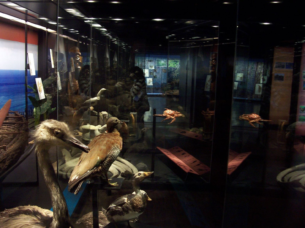 Museo Nacional de Historia Natural (Chile)